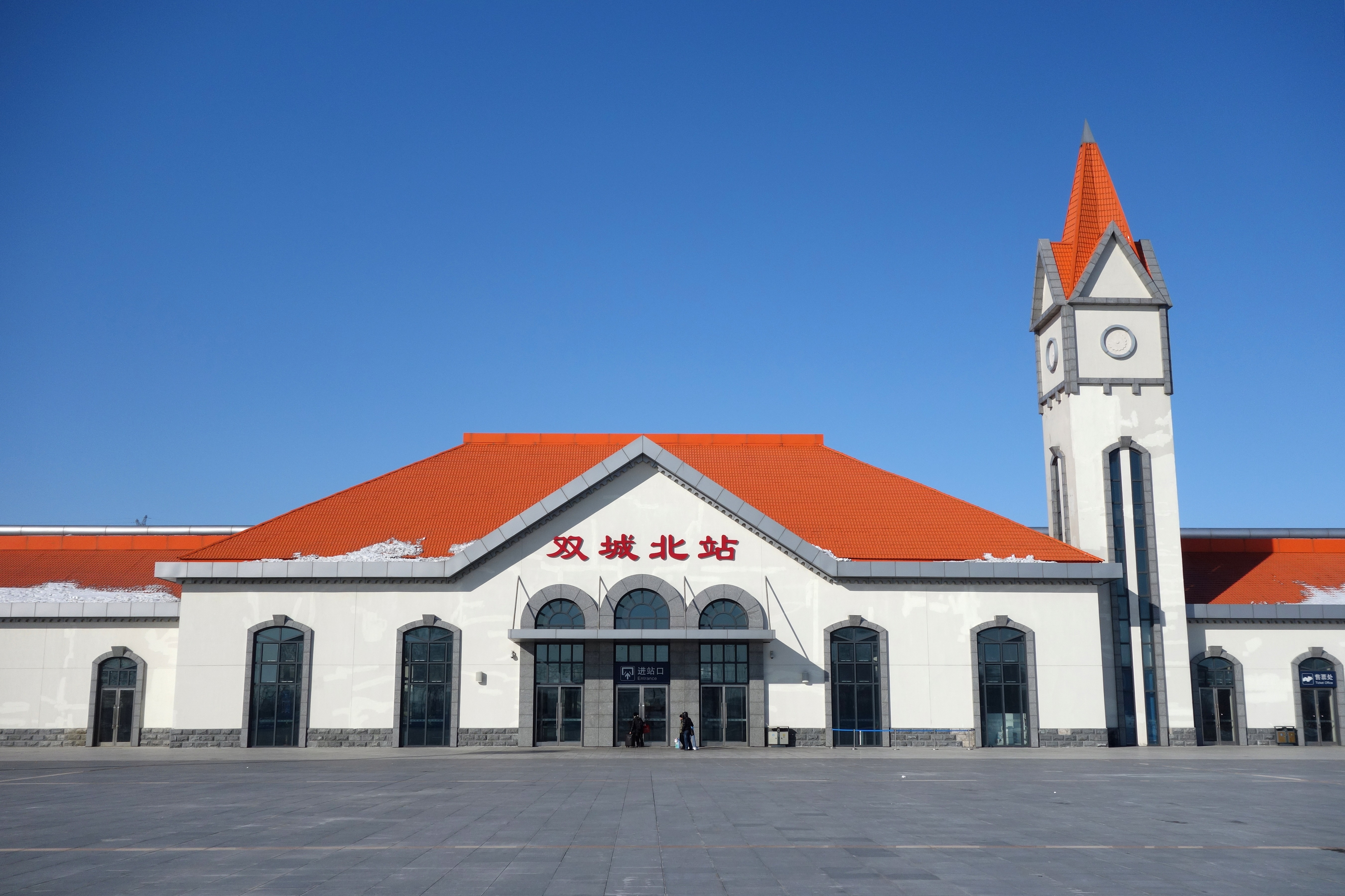 黑龙江省双城北站